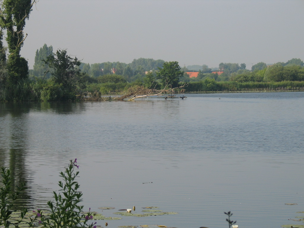 Aalscholvers